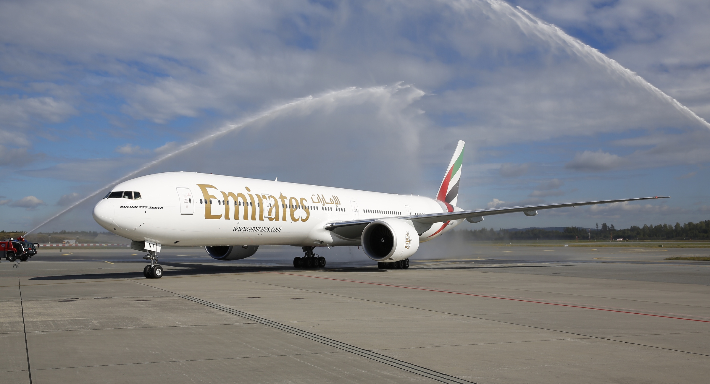 Tirsdag 2. september 2014 landet den første ruteflyvningen med Emirates fra Dubai ved Oslo Lufthavn. Her blir flyet ønsket velkommen av vannkanoner fra brannvesenet ved Oslo Lufthavn.